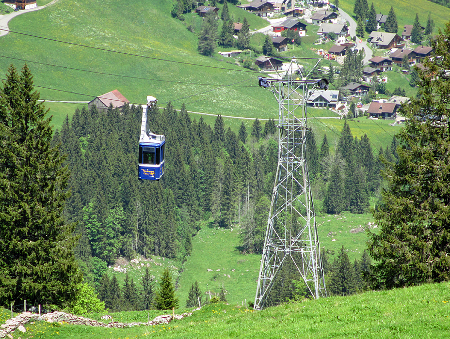 Luftseilbahn Alpthal/Brunni - Holzegg